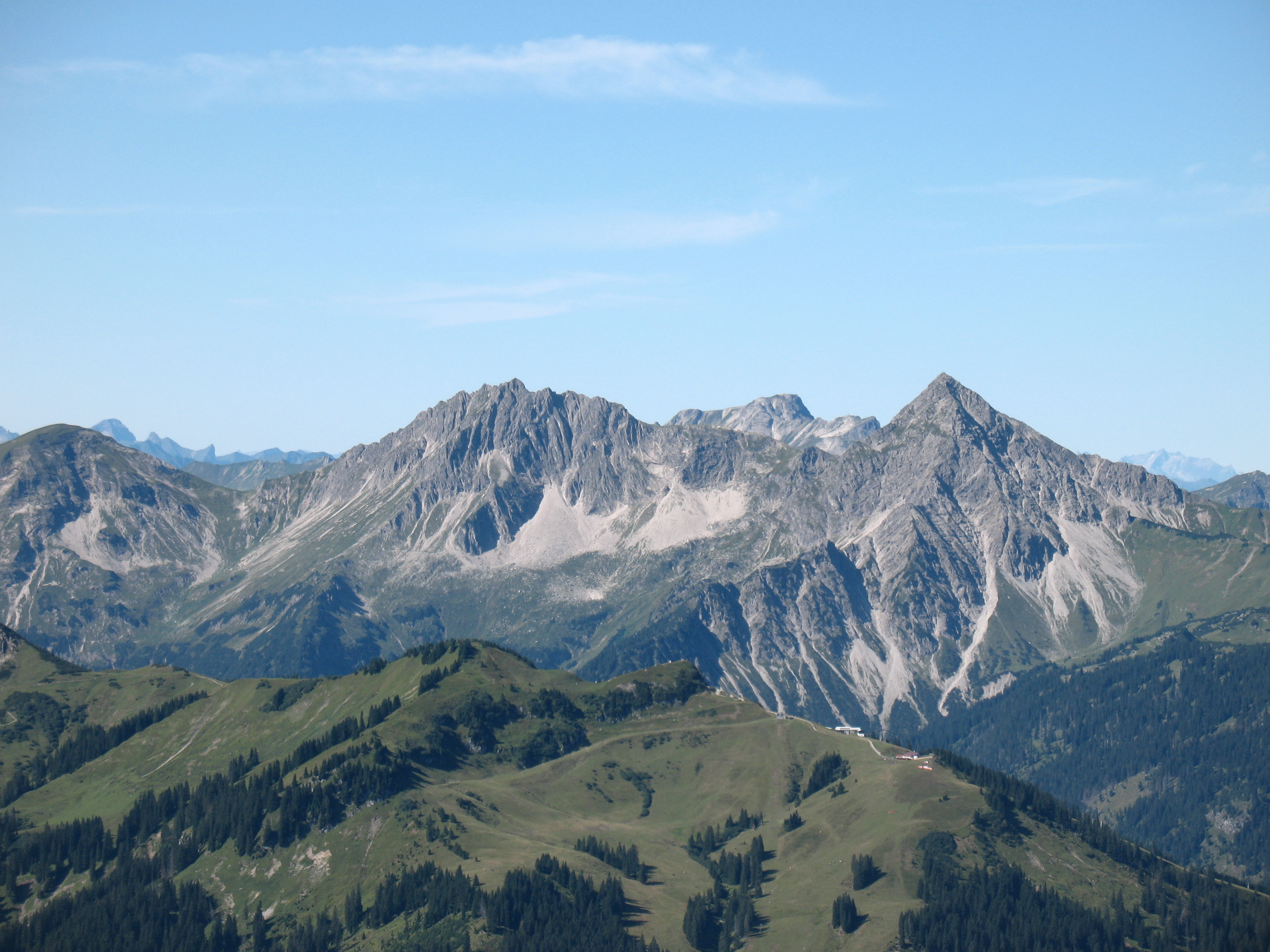 Gaishorn (2247 m), Rauhhorn (2240 m) und Kugelhorn (2126 m) (v.r.n.l)